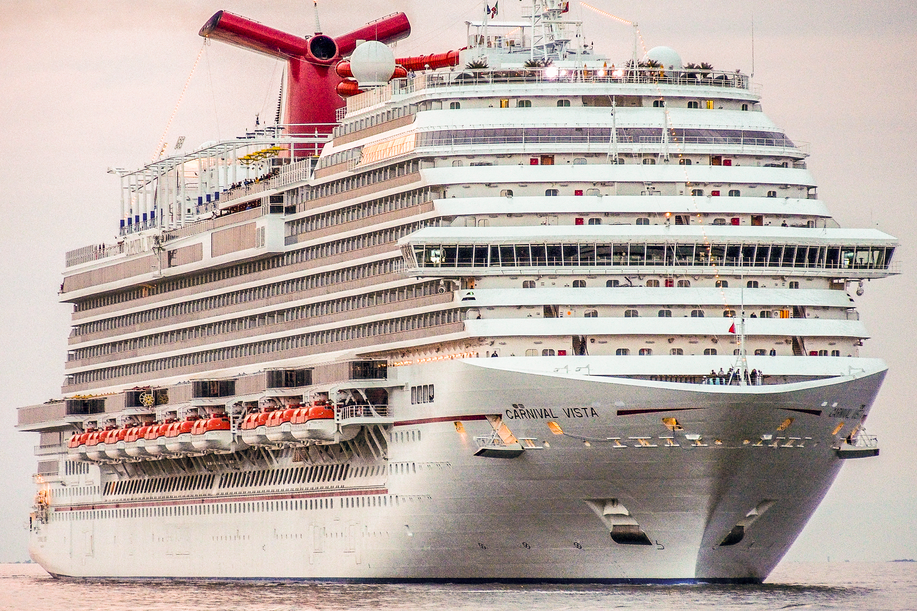 TRIESTE NAVI © Antonio Marano